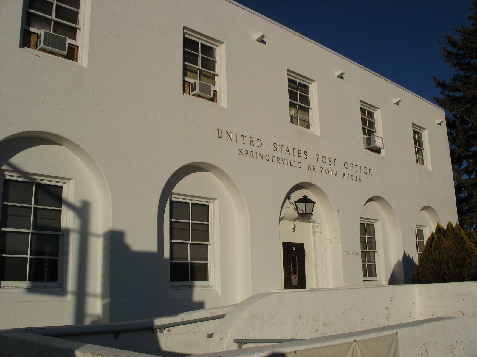 Post Office in Springerville, Arizona 85938